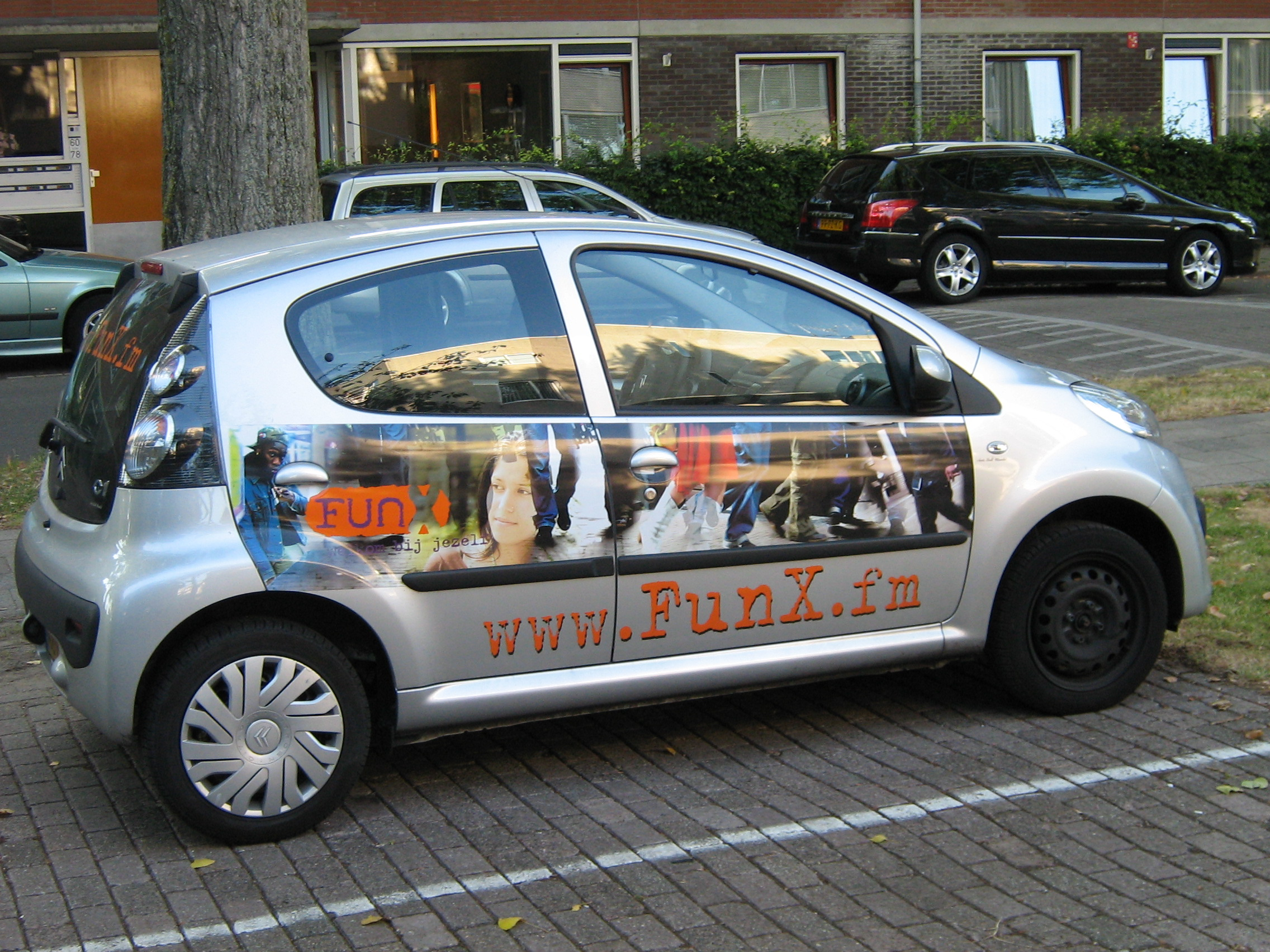 Een radio FunX auto (een zo groot mogelijke versie van de afbeelding)